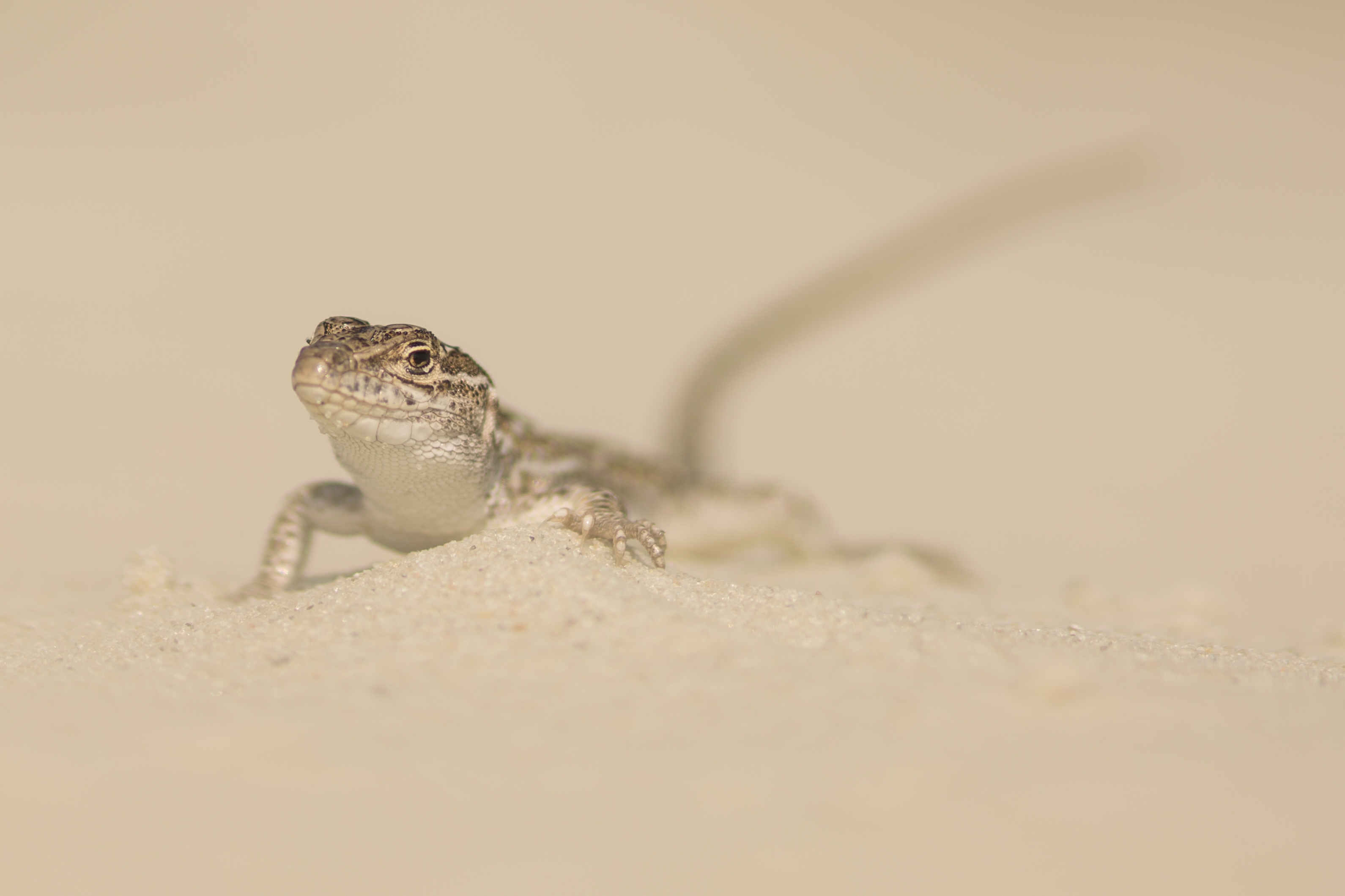 Знято під час експедиції на о. Джарилгач This photo/video of Dzharylhach was taken during Wikiexpedition to Dzharylhach supported by Wikimedia Ukraine.You can see all photographs in category Category:Wikiexpedition to Dzharylhach. English | українська | +/−